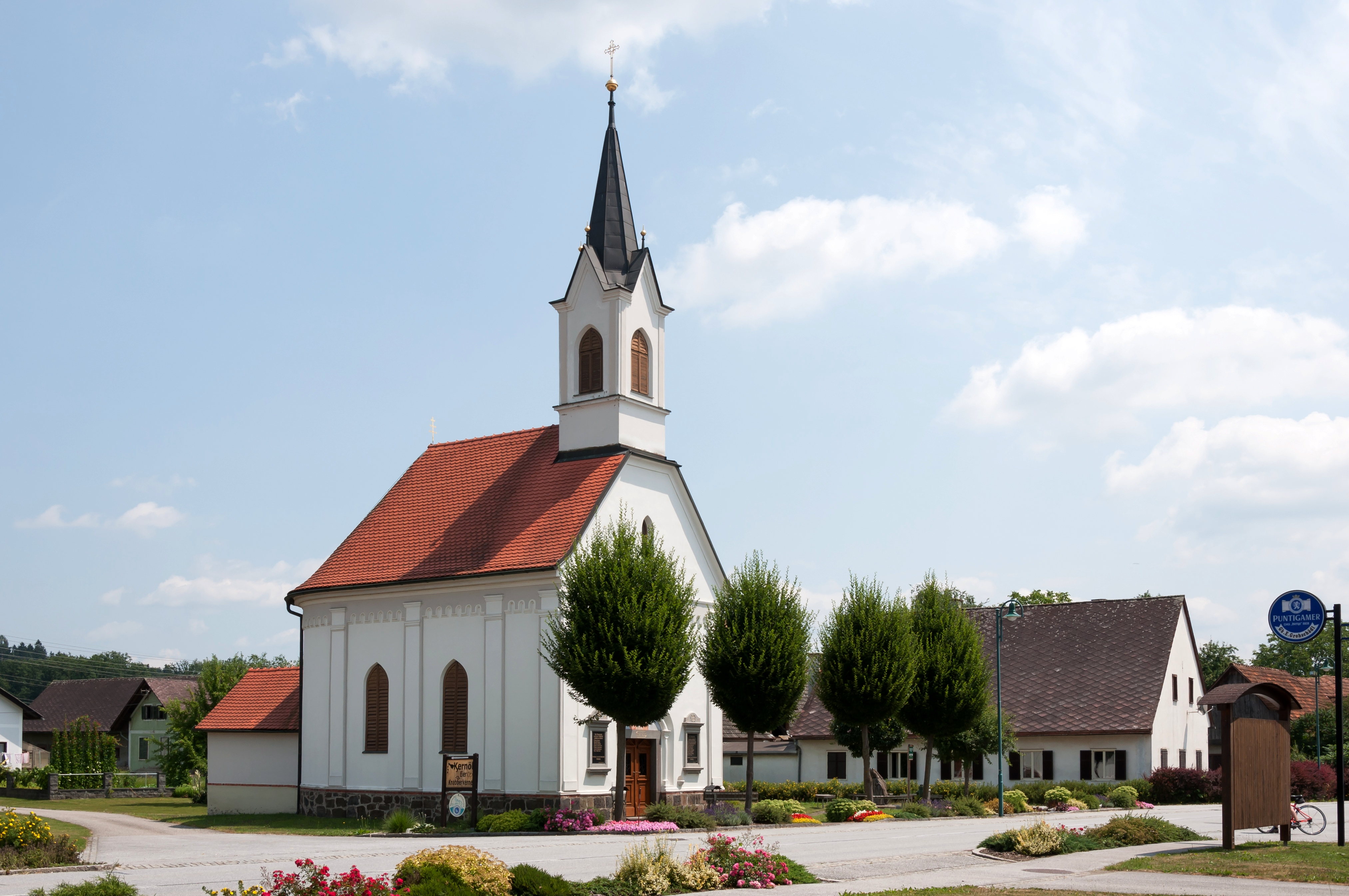 Ortskapelle Zwaring